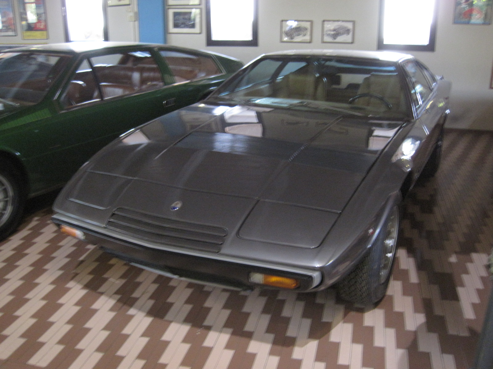 Automobiles in Panini Maserati Museum in Modène